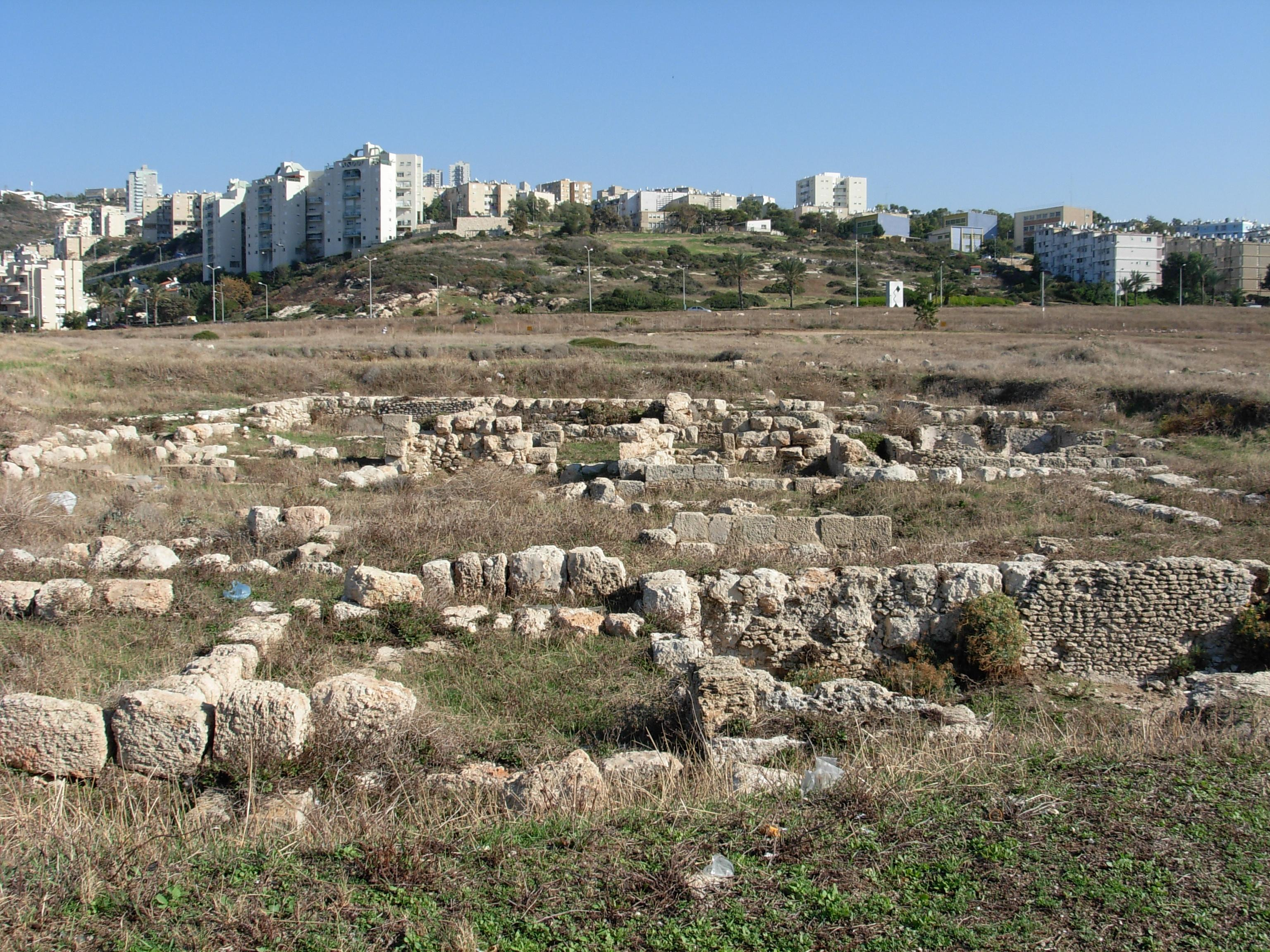 Batei Bad in Tel Shikmona רישיון נוצר על ידי משתמש:שועל